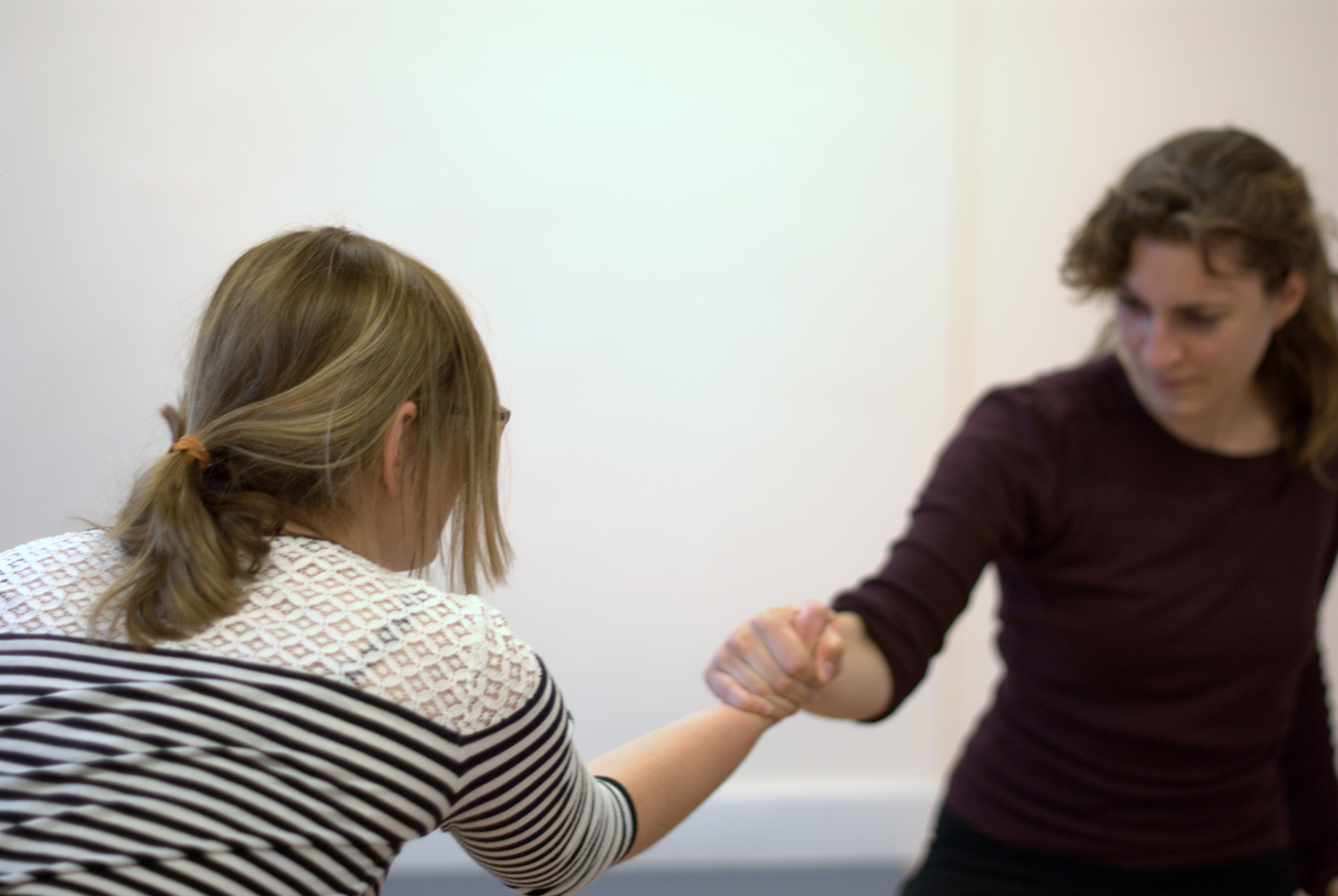 Dramatherapeutische werkvorm.